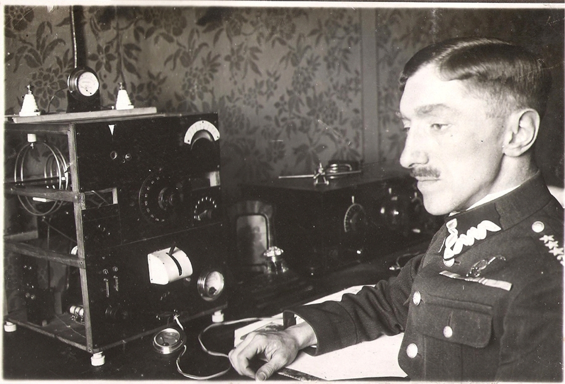 Kapitan pilot obserwator Józef Mickiewicz przy aparaturze radionadawczej własnej konstrukcji. Znak SP1AE.